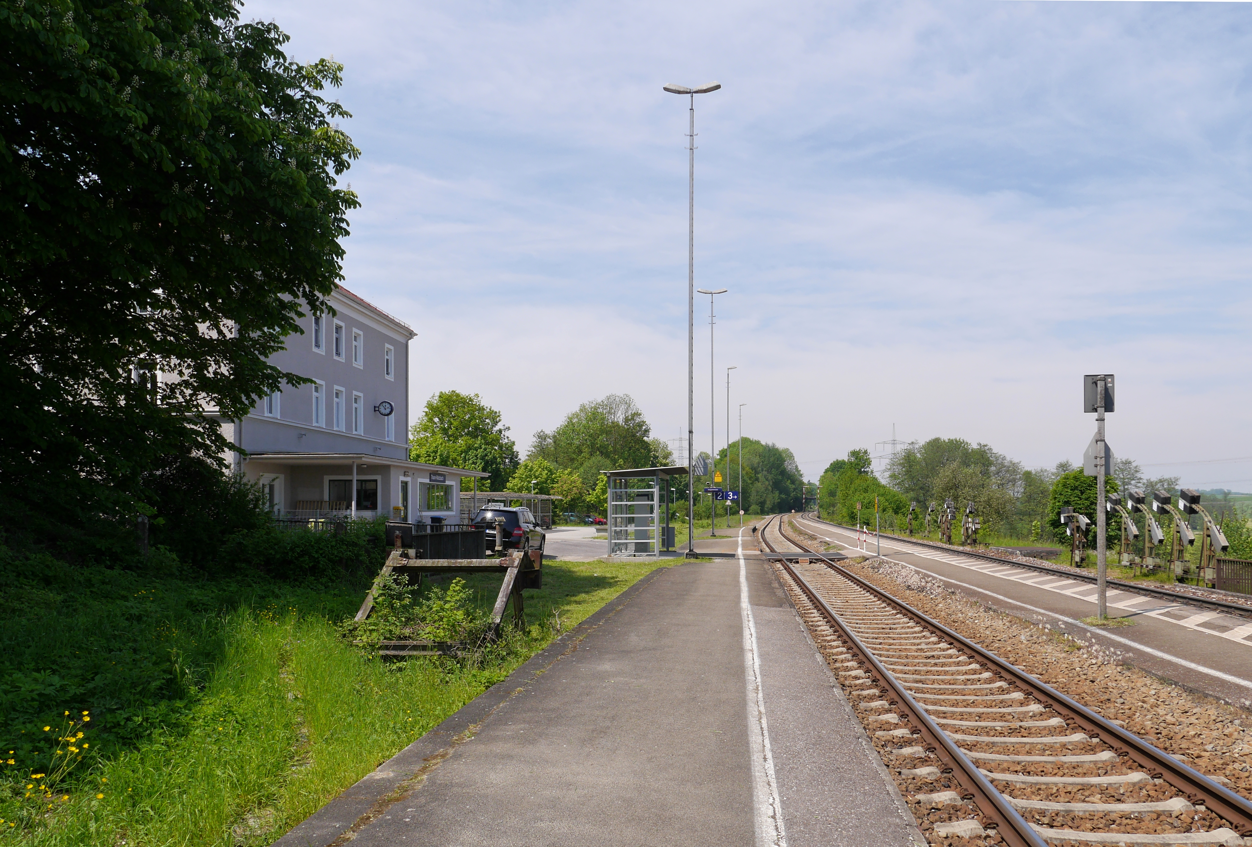 Bahnsteige des Bahnhofs Thann-Matzbach von Osten. Links das Empfangsgebäude und der Prellbock des stillgelegten Gleises 1, rechts die noch betriebenen Gleise 2 und 3.